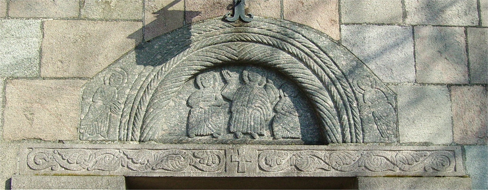 Vejlby Kirke,Norddjurs Kommune. Hårders protal top